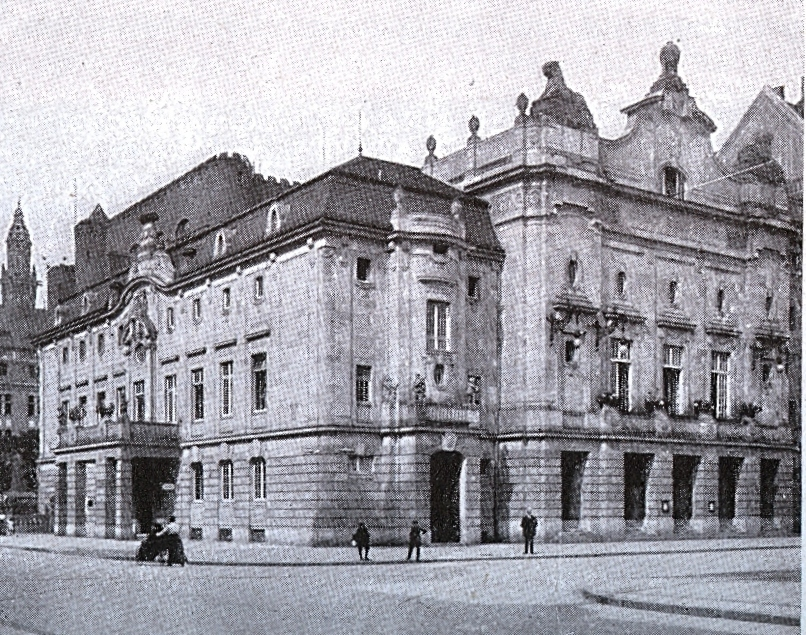 Schauspielhaus in Düsseldorf, Karl-Theodor-Straße / Kasernenstraße; erbaut 1904-1905 nach Entwurf des Berliner Architekten Bernhard Sehring für Louise DuMont-Lindemann und Gustav Lindemann; später Eigentum der Stadt Düsseldorf; 1943 kriegszerstört